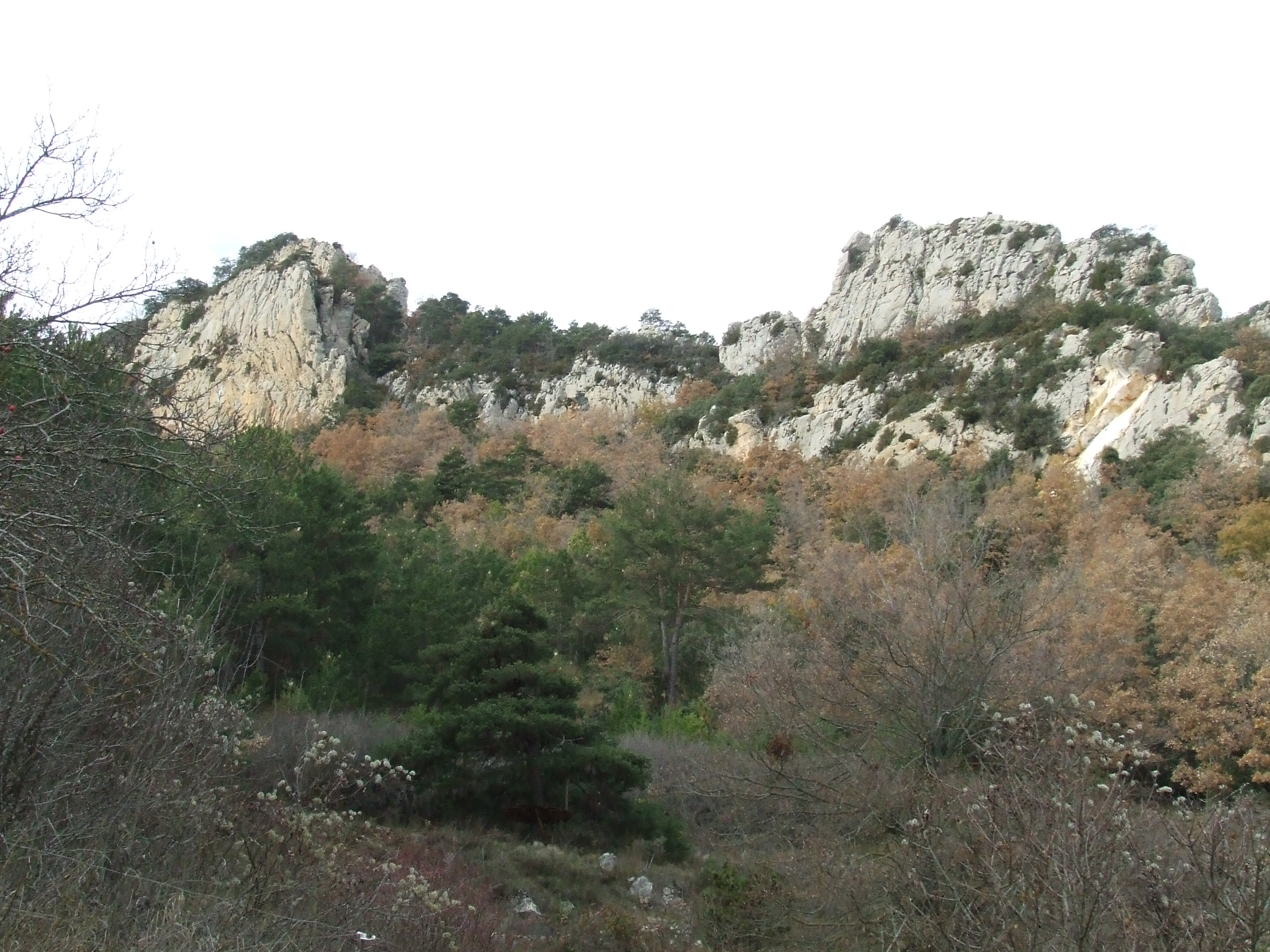 Formació de roques on hi havia, al capdamunt i a l'esquerra, Ca l'Arte (Faidella, Abella de la Conca, Pallars Jussà)